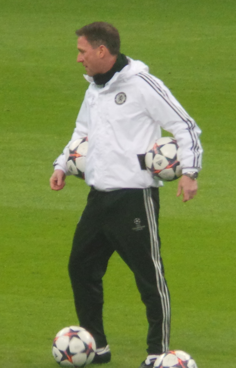 Steve Holland